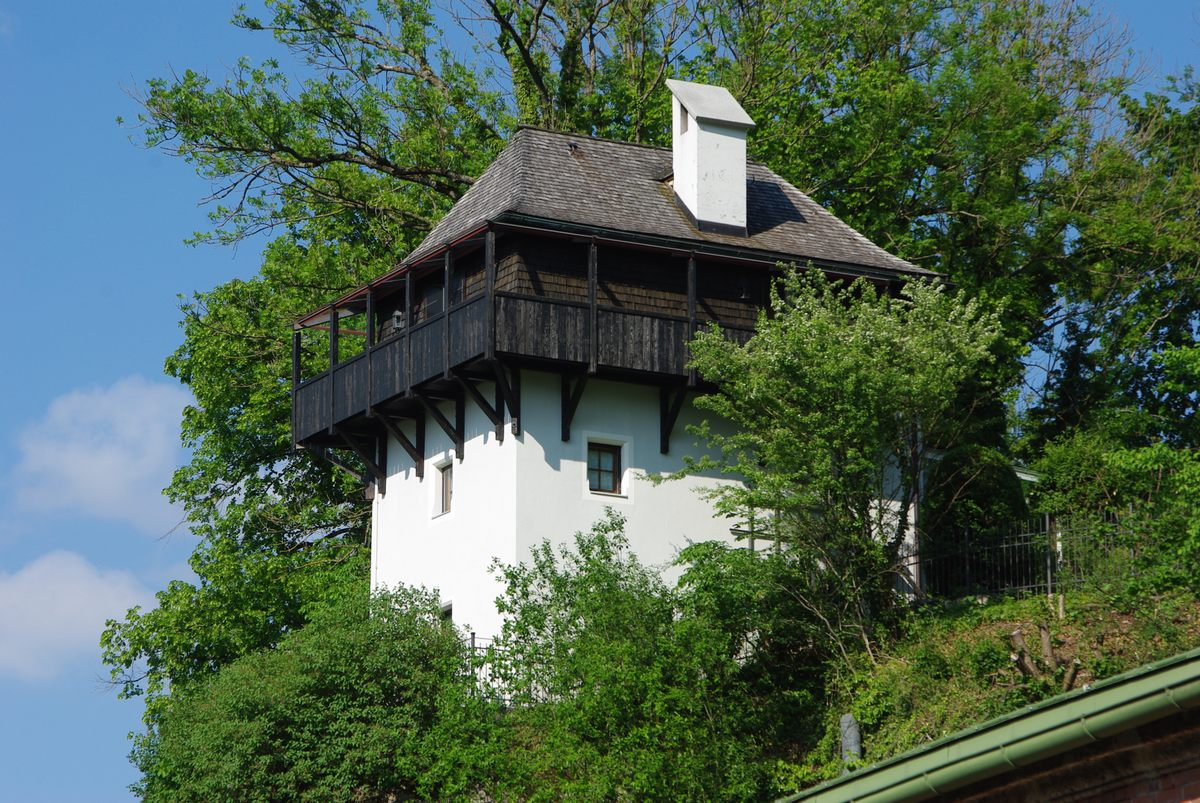 Pfannhauserweg 2, Bad Reichenhall (Feuerwachtturm)This is a photograph of an architectural monument.